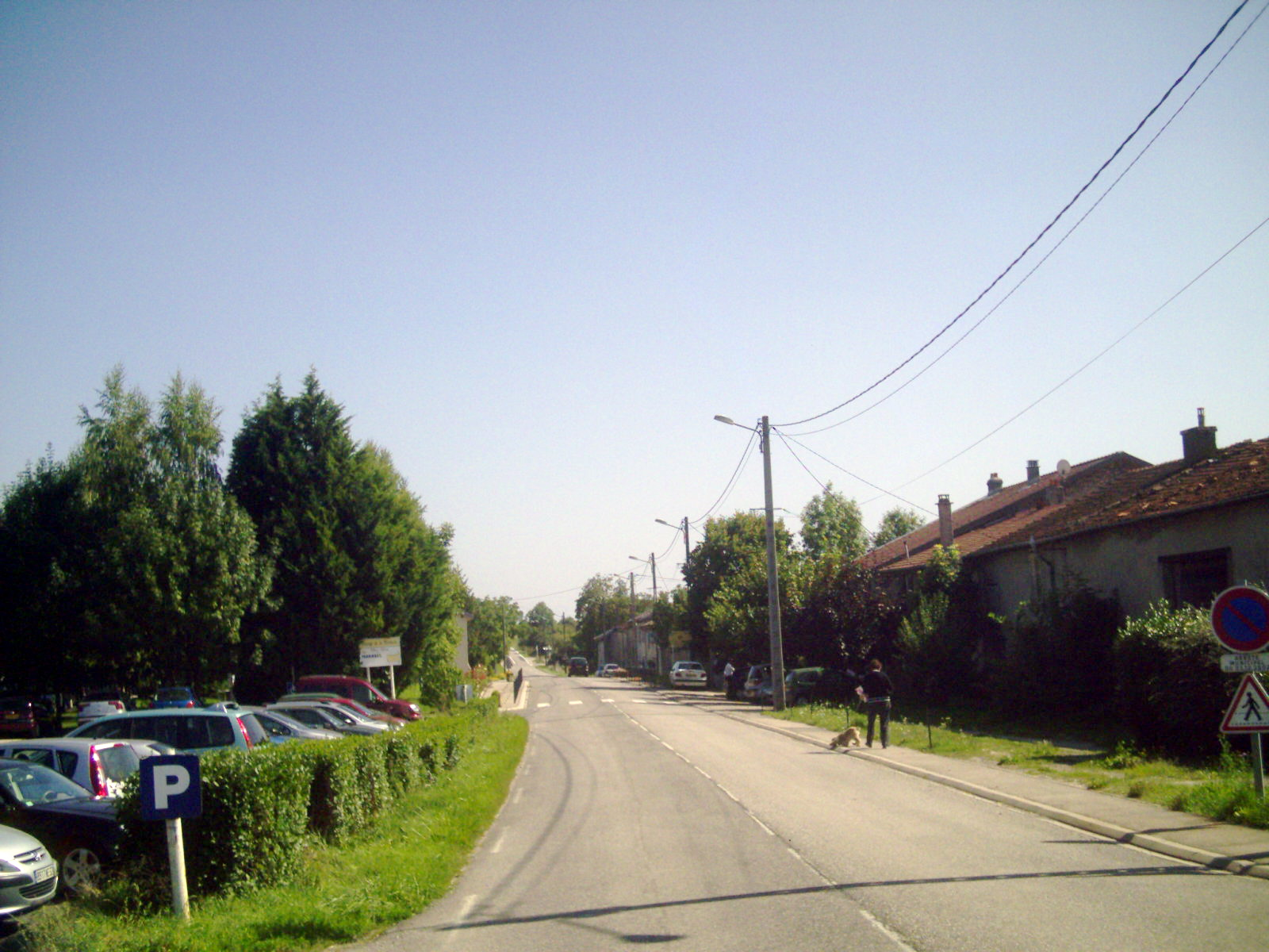 Commune de Ferrières